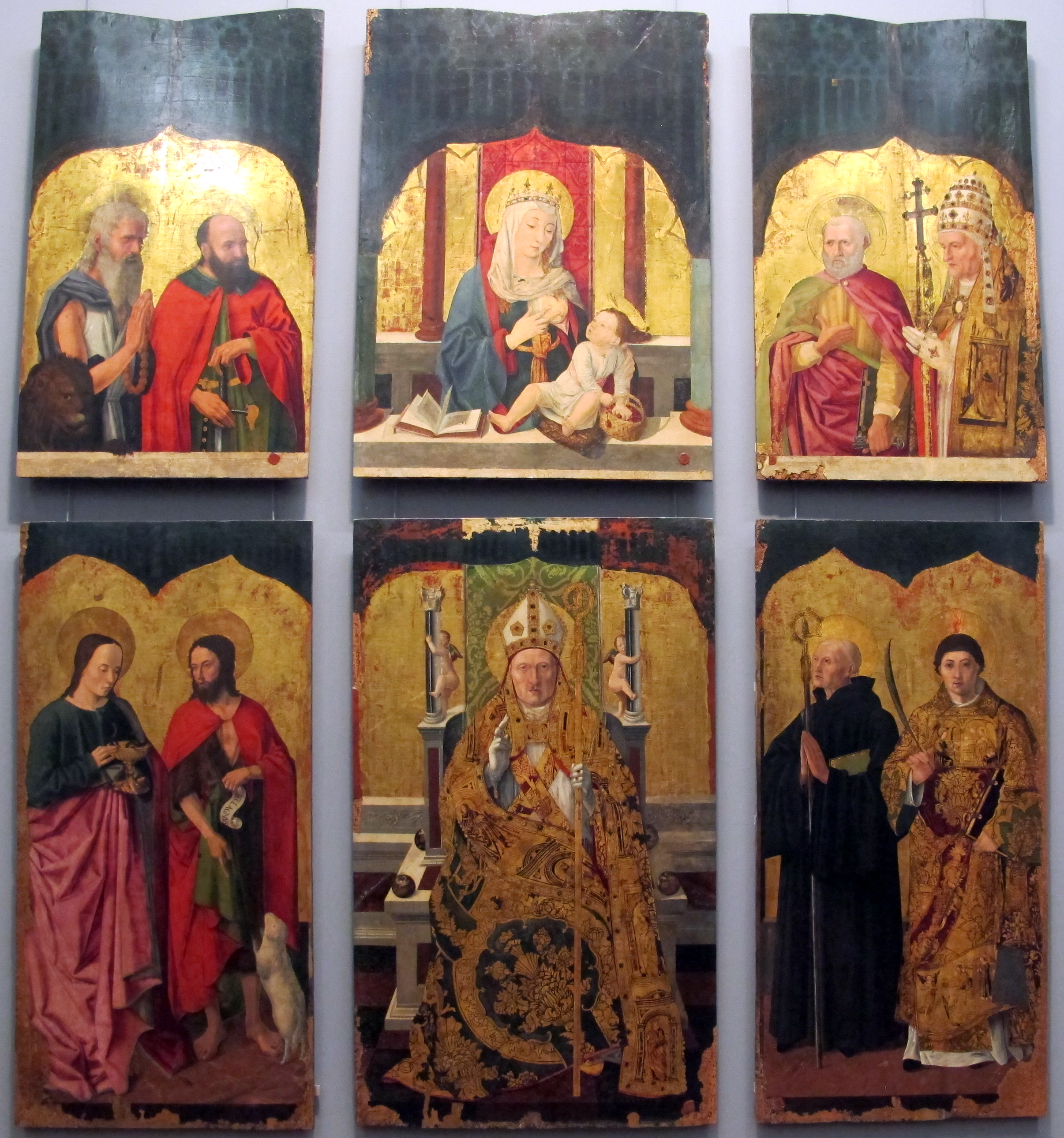 Galleria Napoletana (Museo di Capodimonte)